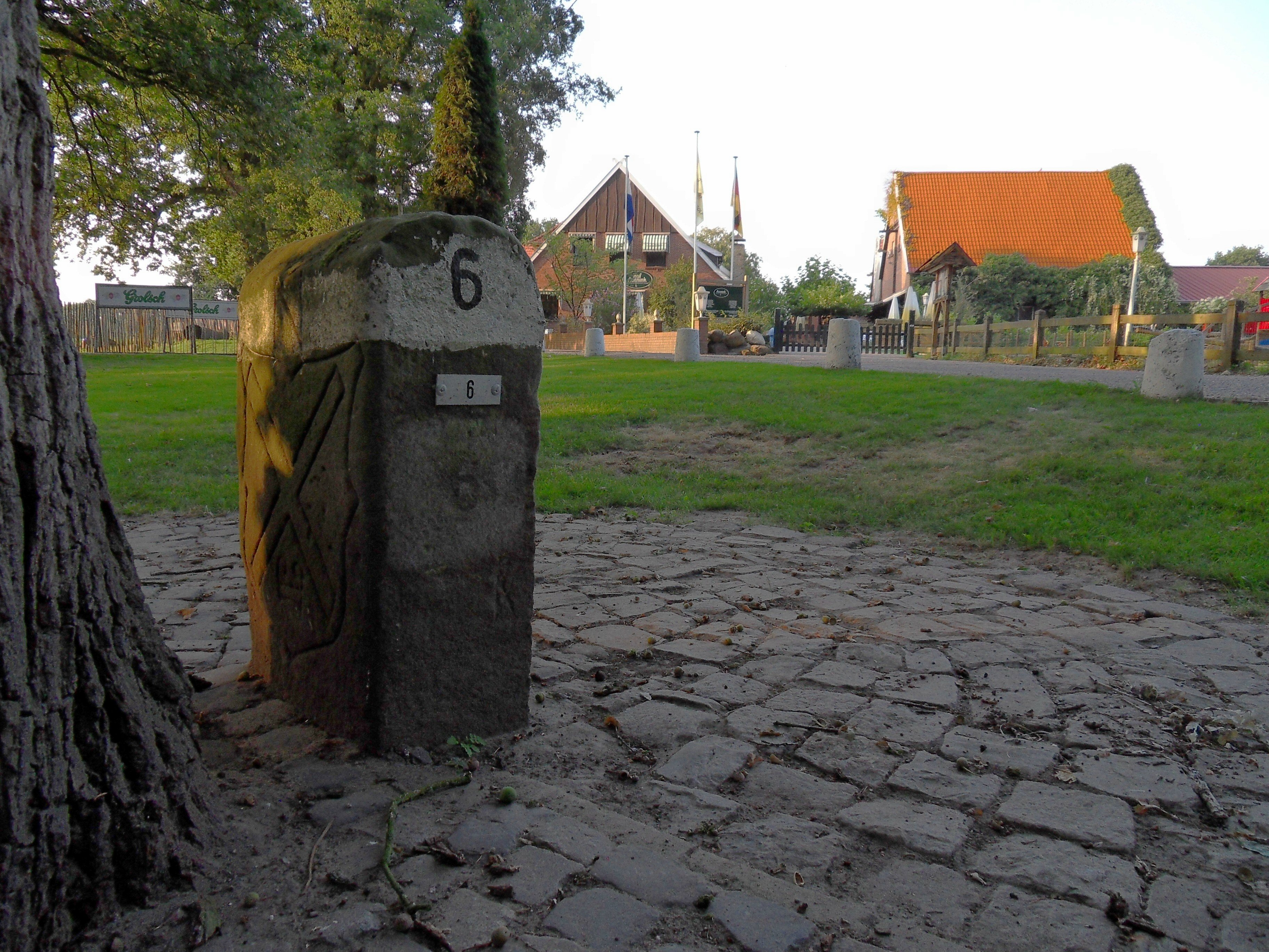 grenssteen 6 bij Erve Aarnink (vroeger Verbecke)